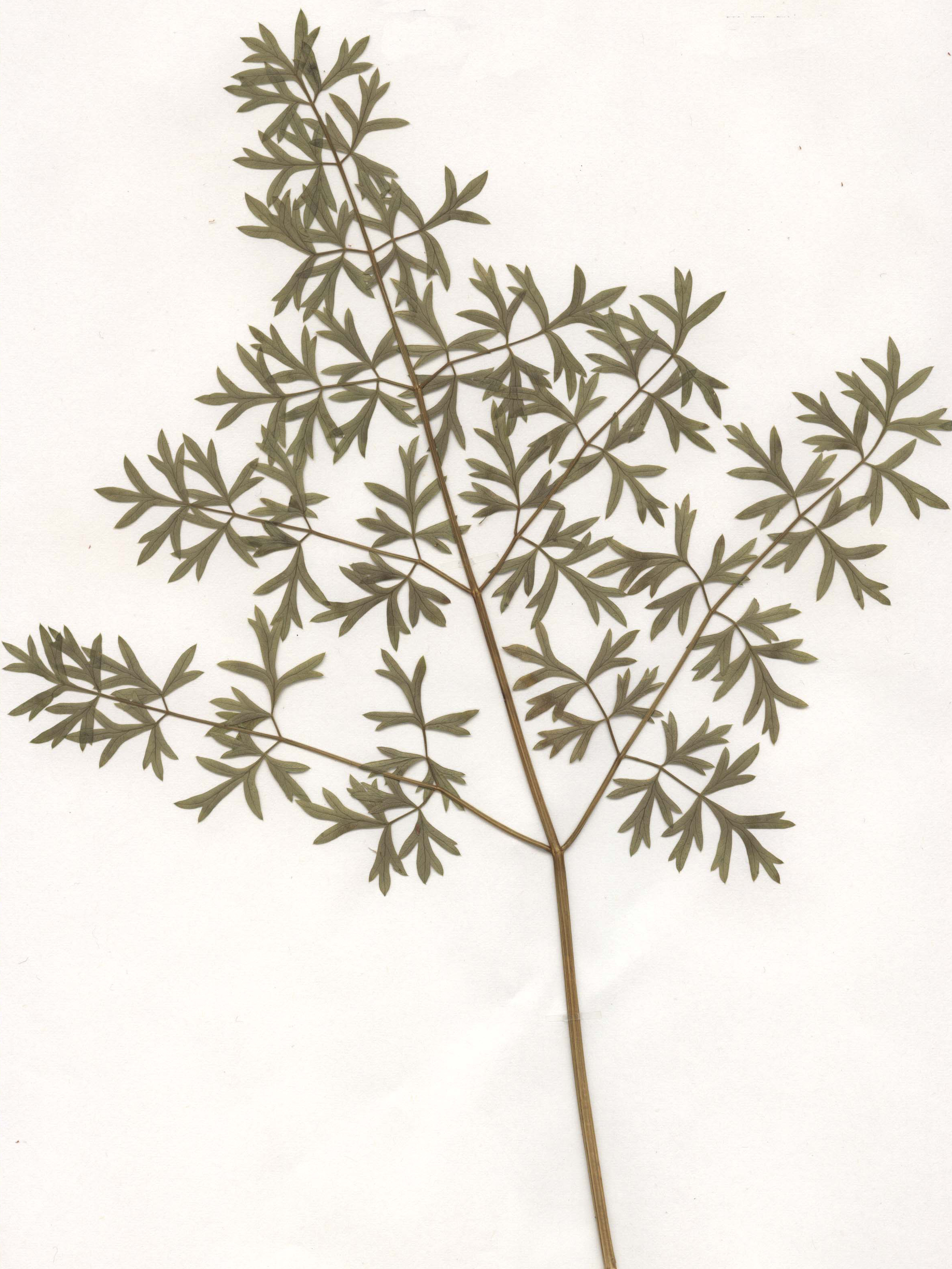 Peucedanum alsaticum, Stängelblatt, eigener Herbarbeleg von 1982, Unterfranken